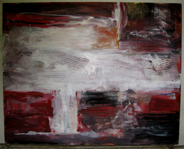 Das Bild entstand nach einer Italienreise, bei der Gerhard Konopa auch Pompeji besuchte.